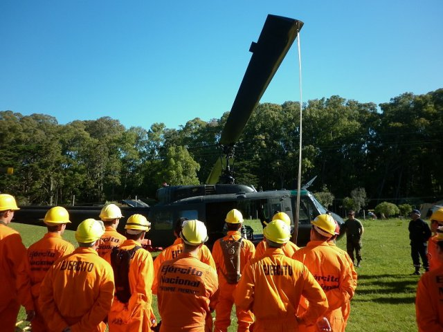 Capacitación organizada por el SINAE sobre incendios en Rocha